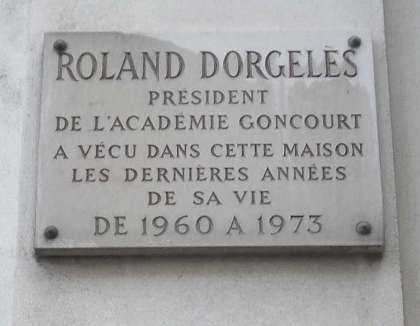 Plaque apposée au n° 2 de la rue Mabillon, Paris 6e, où vécut l'écrivain Roland Dorgelès (1885-1973) de 1960 à 1973.